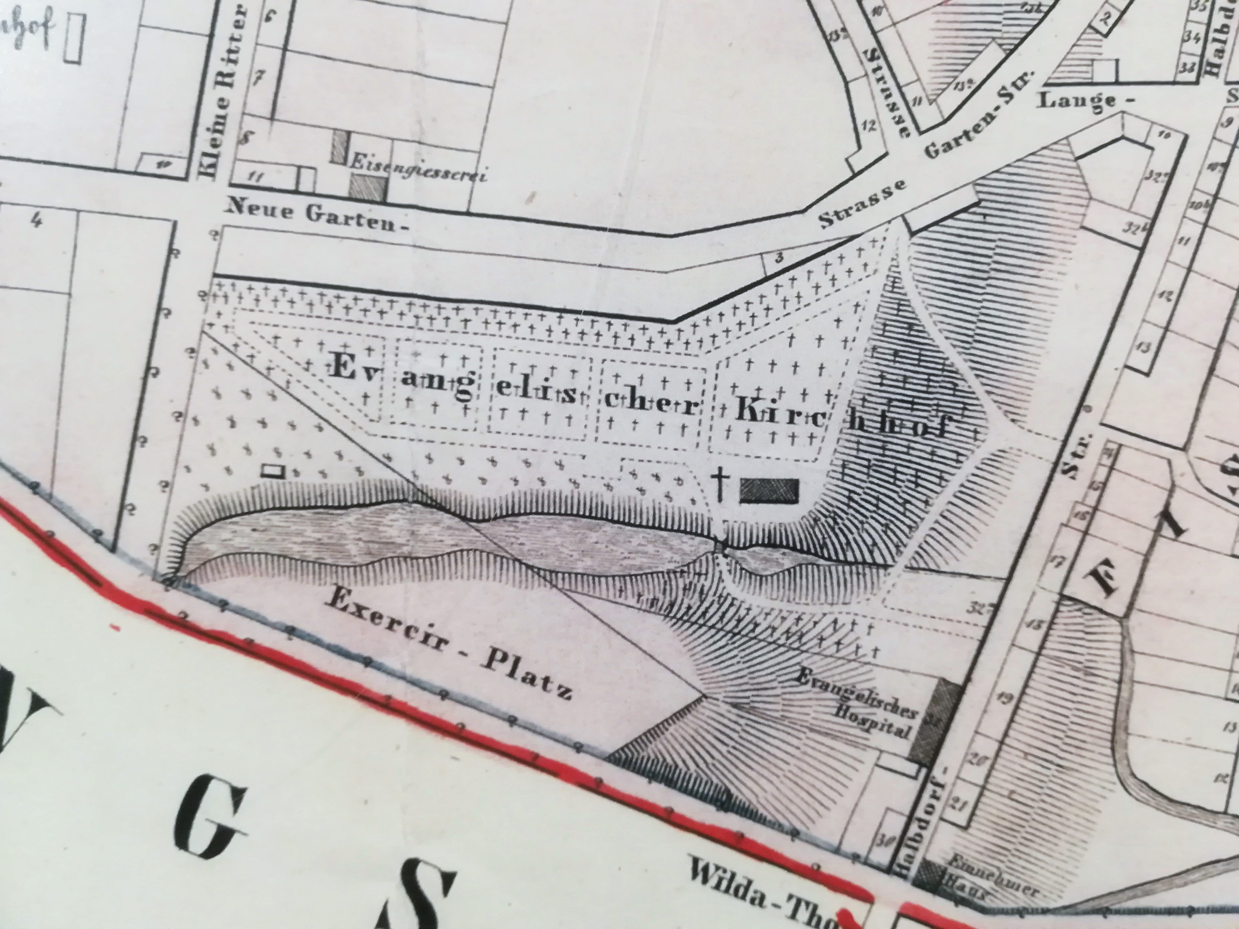 Plan Poznania - F.Corvinus, 1856r.